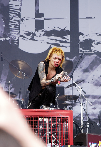 Dir en Grey